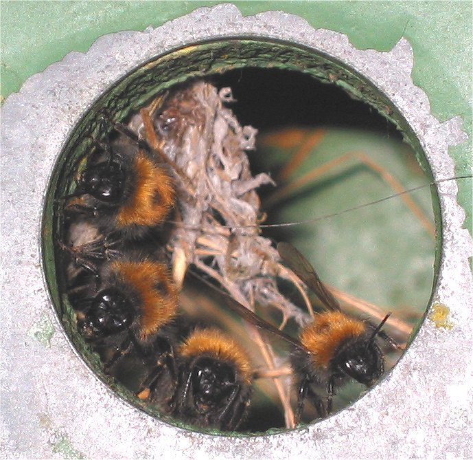 (Boomhommels op wacht in vogelhuisje) Bombus hypnorum on guard